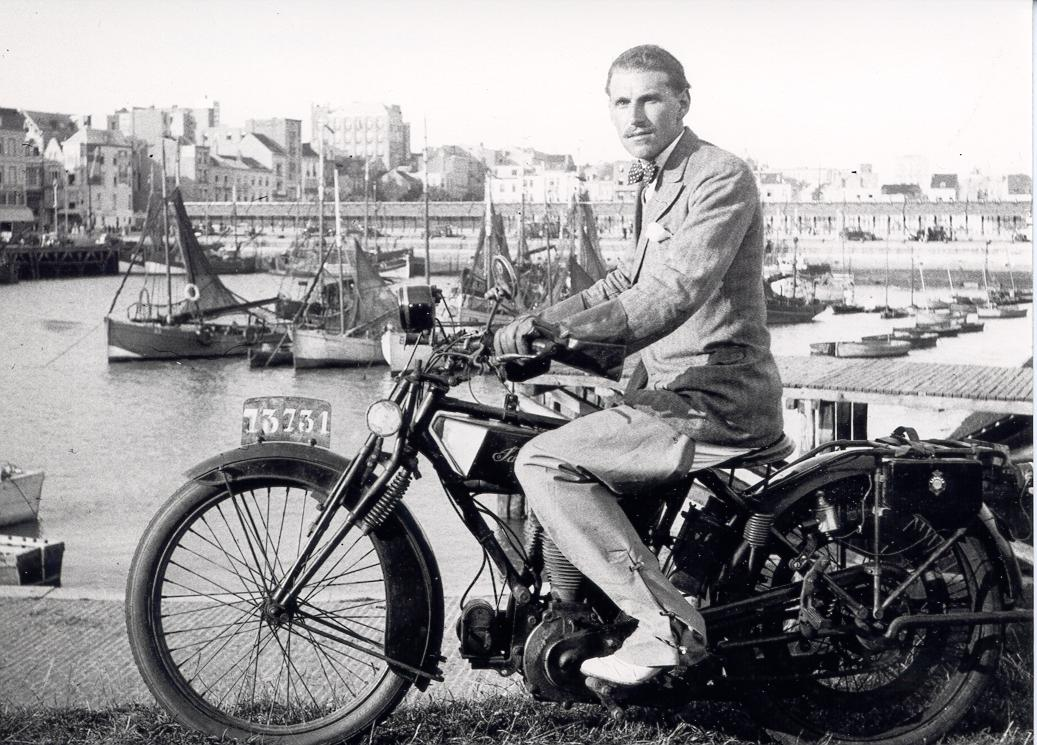 Léon van Dievoet (1907-1993), architecte, chevalier de l'Ordre de Léopold et chevalier de l'Ordre de la Couronne, sur sa moto Saroléa à Blankenberghe